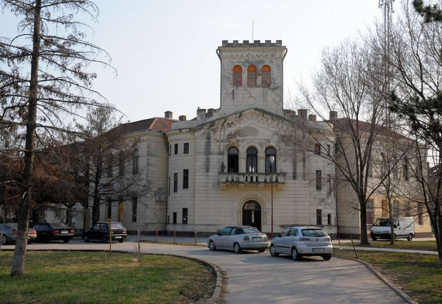 Uljma,centar